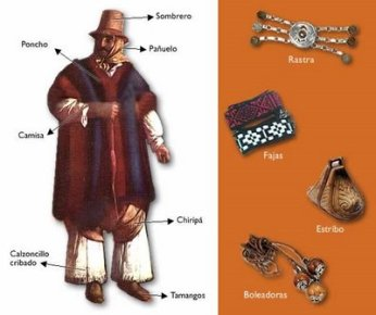 Vestimenta Gaucha en el Siglo 19